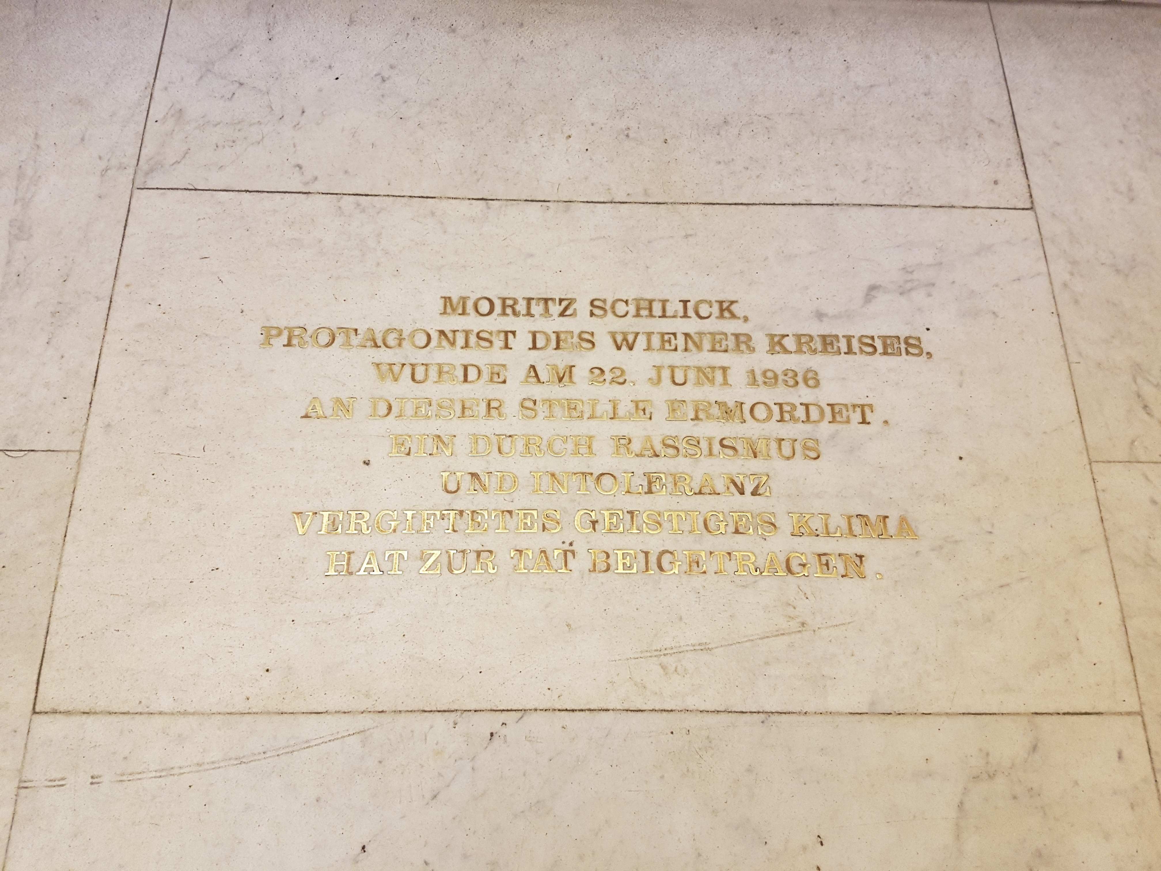 Gedenktafel für Moritz Schlick (Wien, Universitätsring 1, Philosophenstiege)